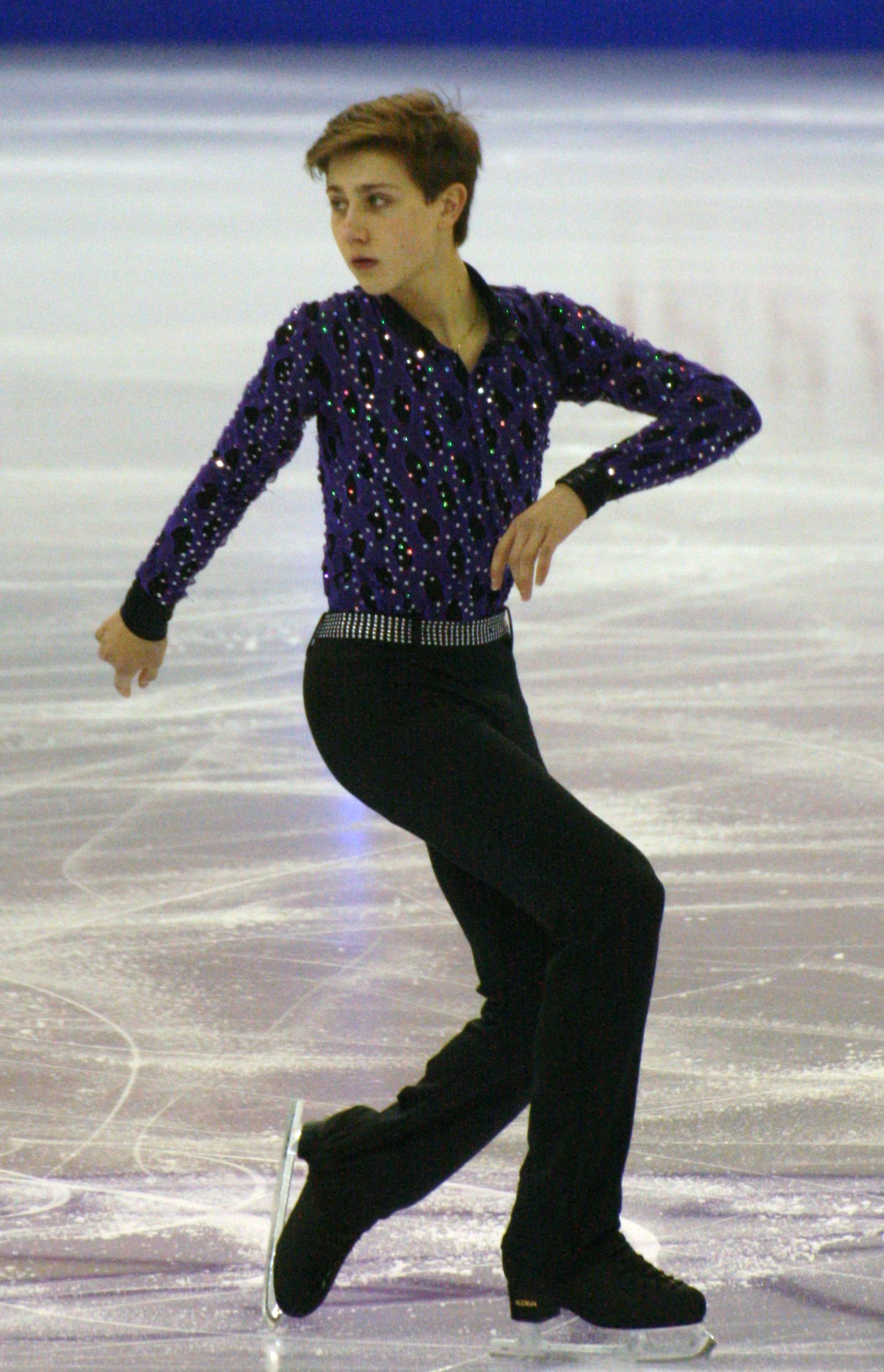 Роман Садовский (Канада) на финале Гран-при по фигурному катанию среди юниоров 2015-2016.